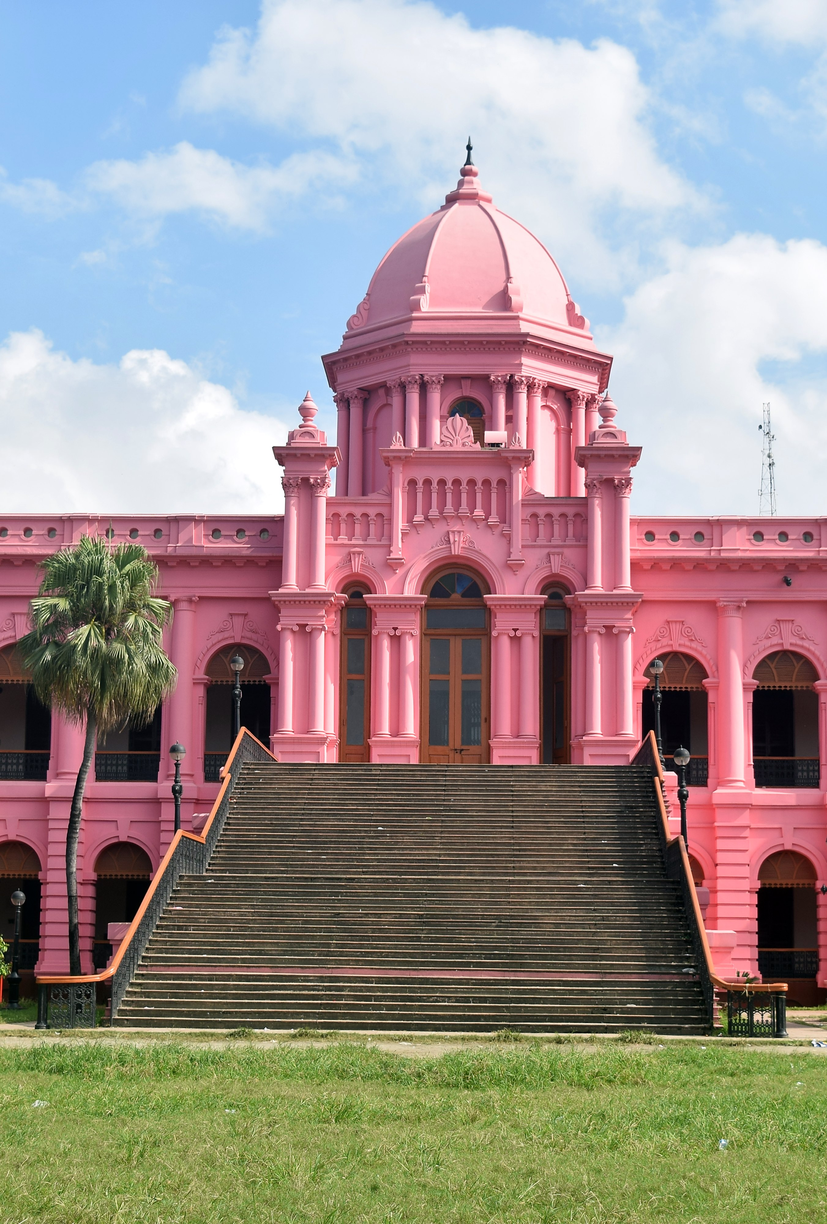 আহসান মঞ্জিল